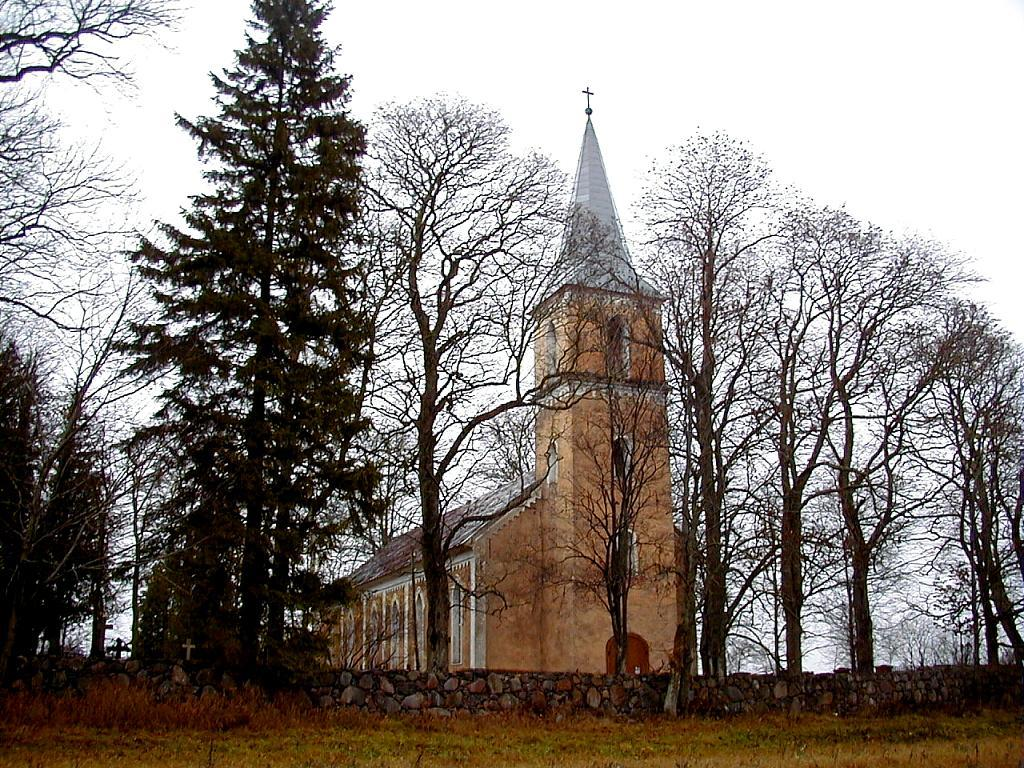 Ārlavas baznīca 2000-11-05